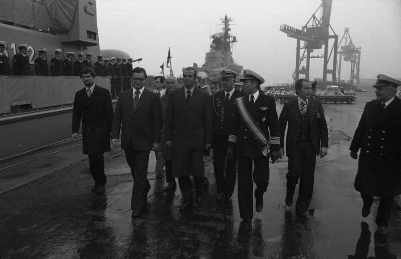 Staatsbesuch König Juan Carlos I. und Königin Sofia von Spanien in der Bundesrepublik Deutschland (21.4.) Bremerhaven: Besuch auf dem Zerstörer Hessen. (2. v. links: Hans Koschnick) 19.-23.4.1977